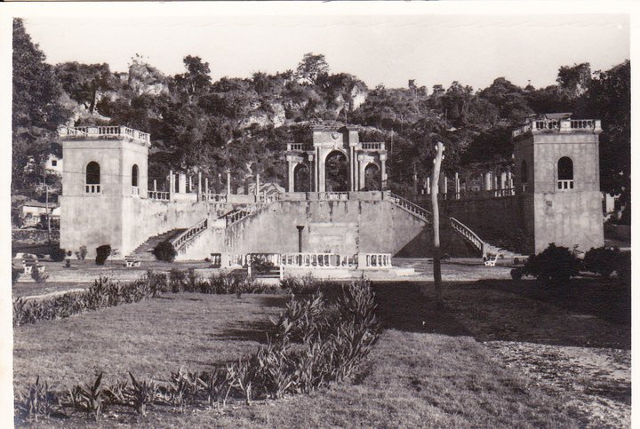 O mercado de Baucau,obra do Administrador Pinto Correia